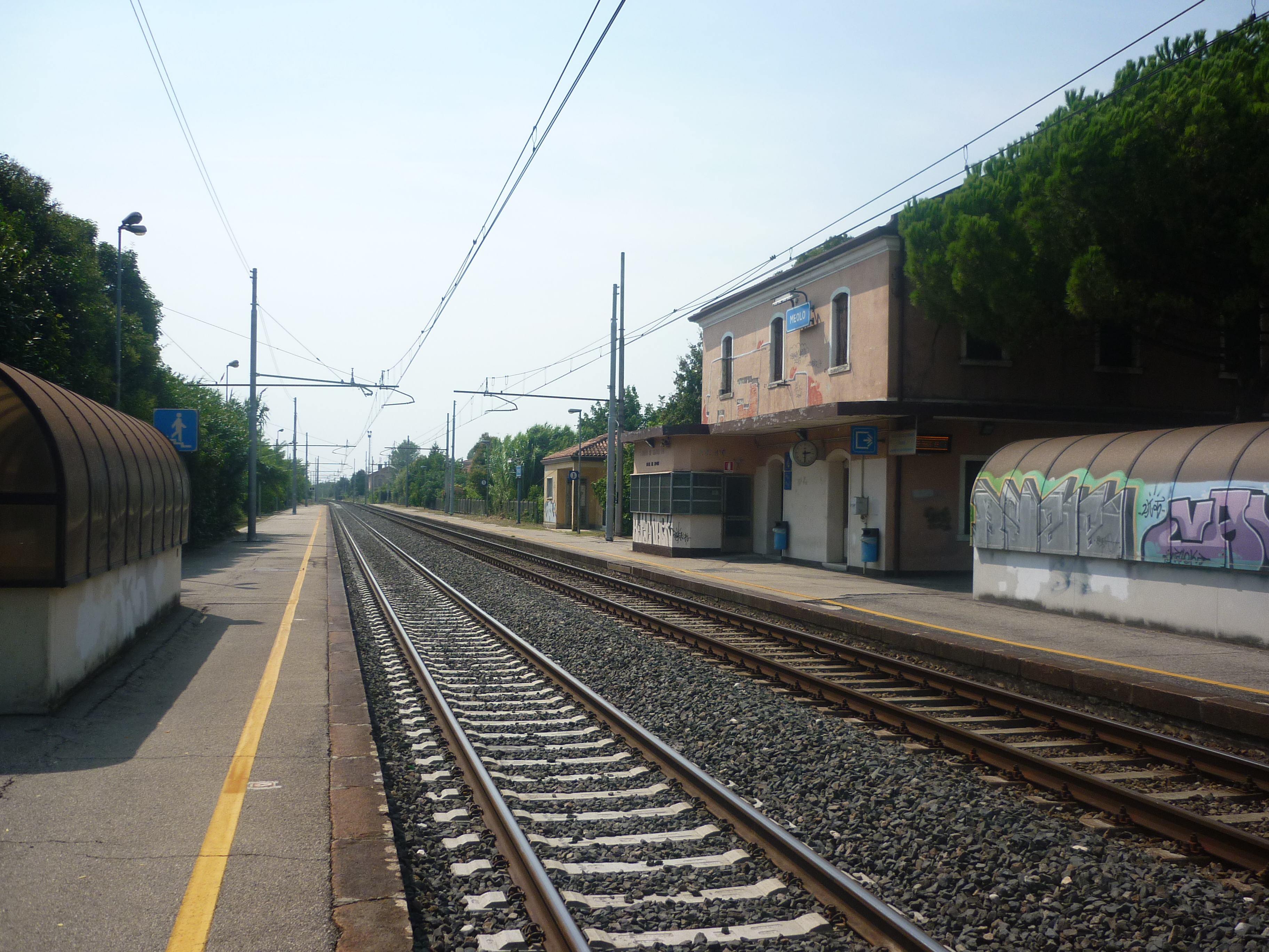 meolo fs